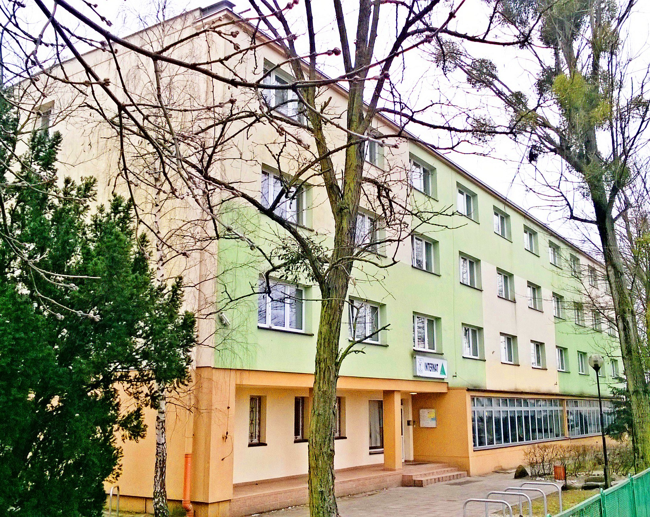 Internat Zespołu Szkół Mechanicznych Elektrycznych i Elektronicznych w Toruniu